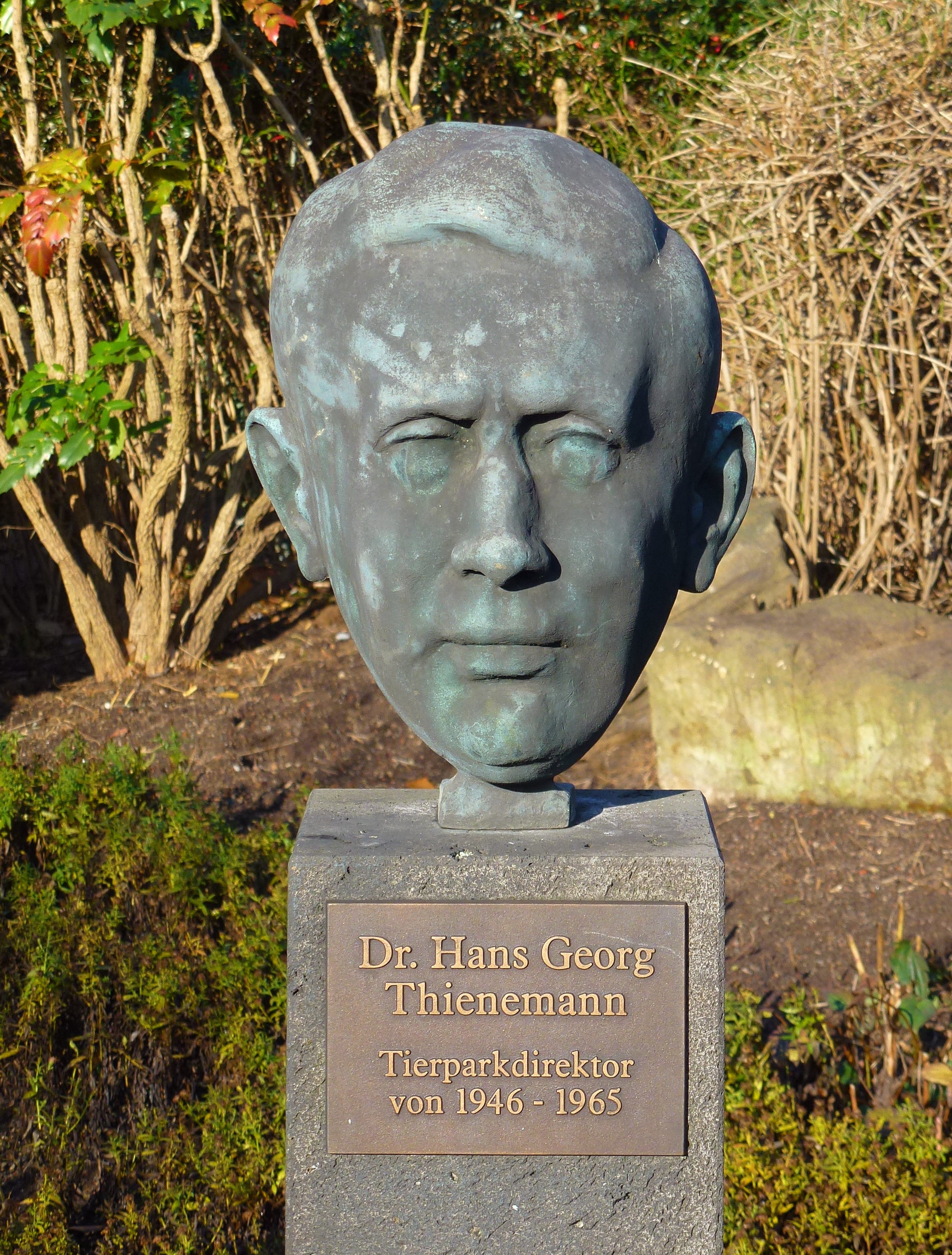 Büste von Dr. Hans-Georg Thienemann im Zoo von Duisburg